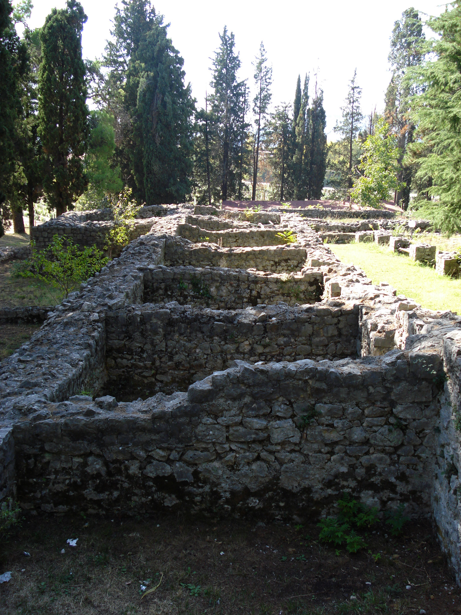 Roman ruins of Mogorjelo near Čapljina, Bosnia and Herzegovina.